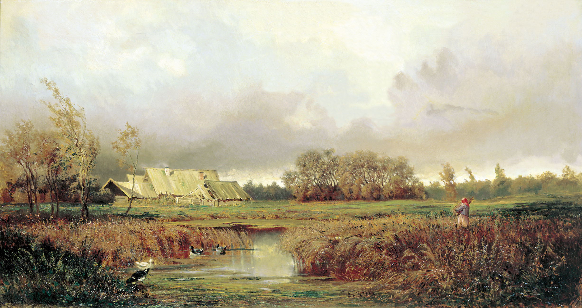 «Болото осенью»label QS:Lru,"Болото осенью"label QS:Lde,"Moor im Herbst"